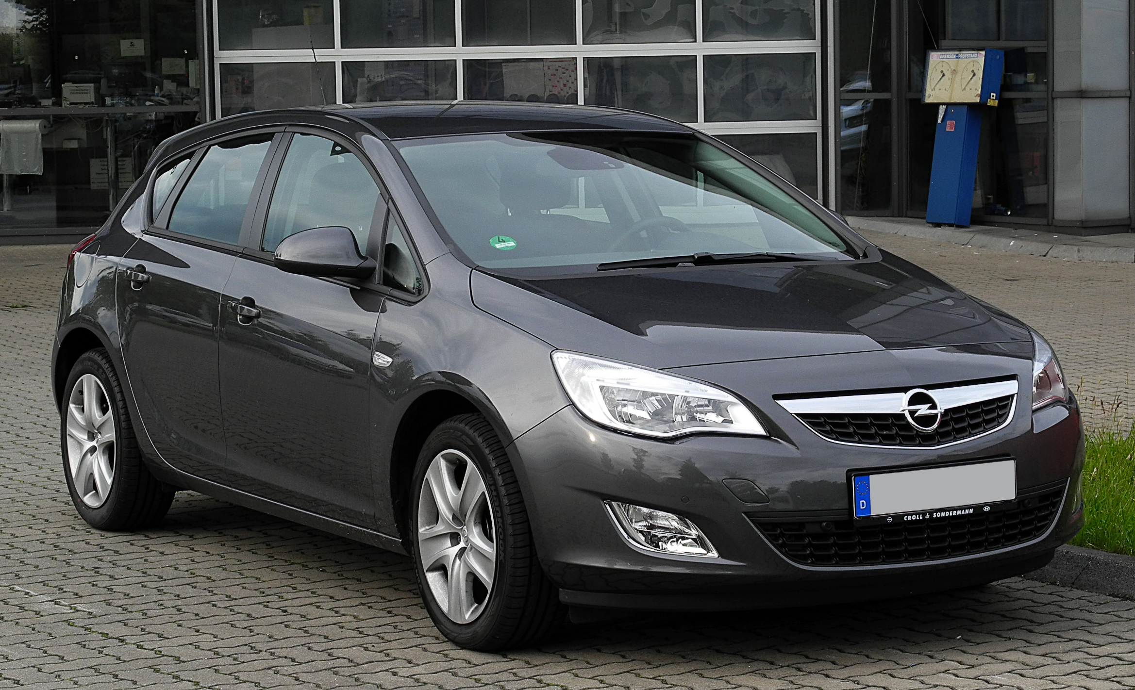 Opel Astra 1.6 Edition (J)